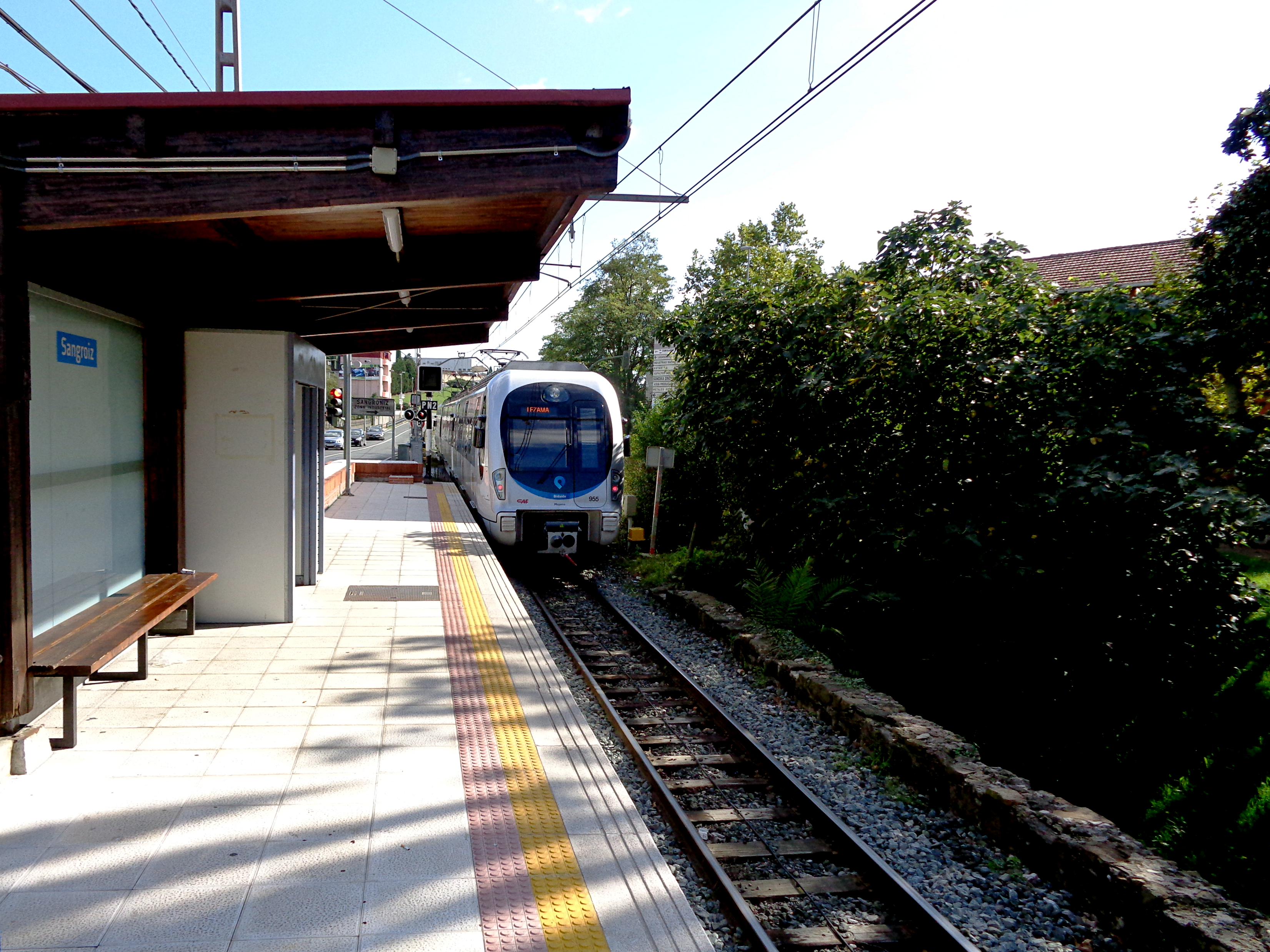 Unidad 958 de Euskotren alejándose del apeadero de Sangróniz (Sangroiz) hacia Lezama.